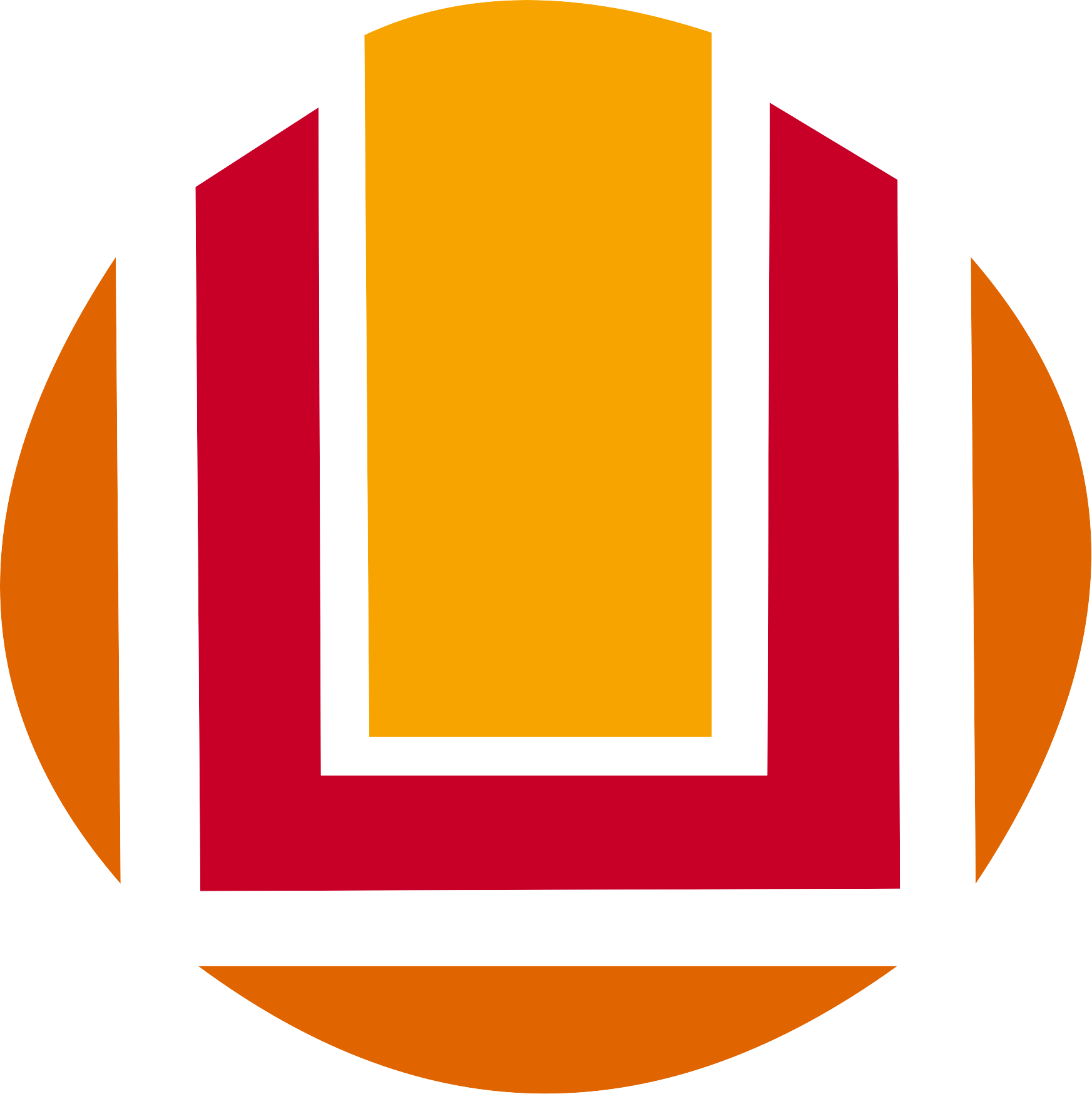 Logo FURG